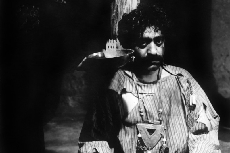 تصویری از فیلم گاو (۱۳۴۸) ساخته داریوش مهرجویی بر اساس داستانی از غلامحسین ساعدی